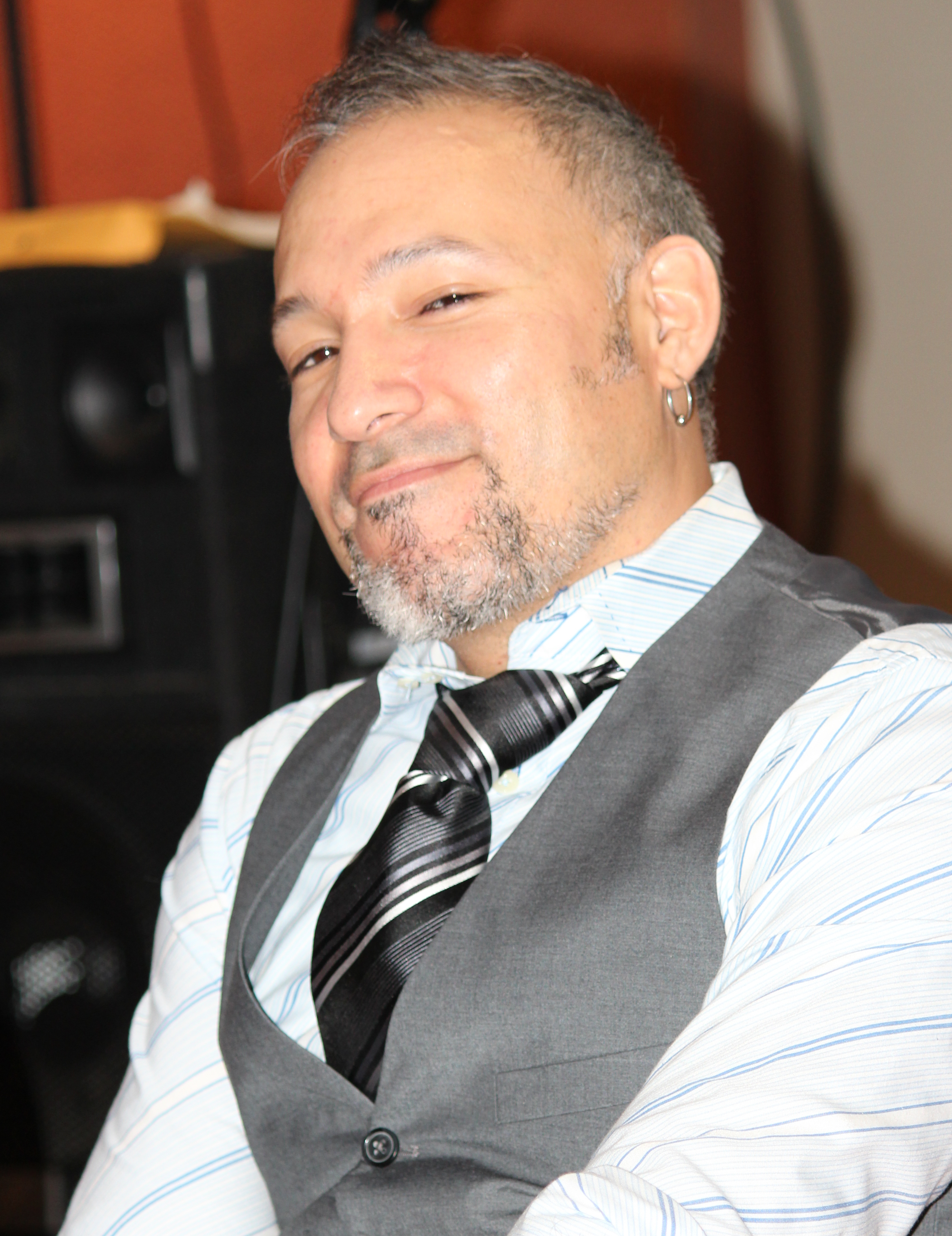 Leraldo Anzaldua at Animate Miami in 2013